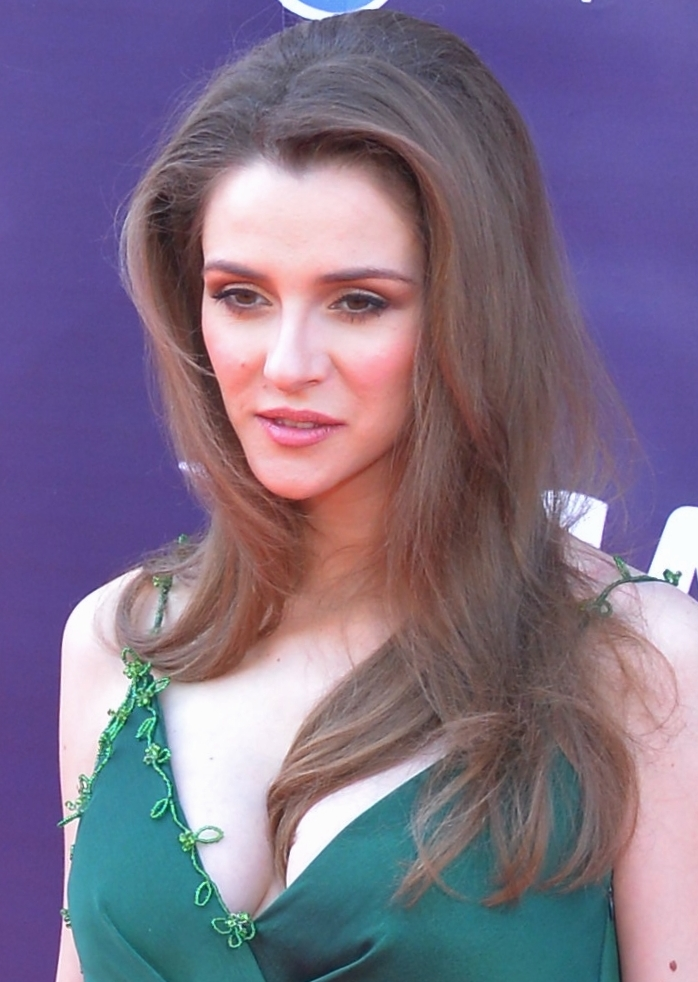 Македонська співачка Яна Бурческа на церемонії відкриття Євробачення 2017 у Києві